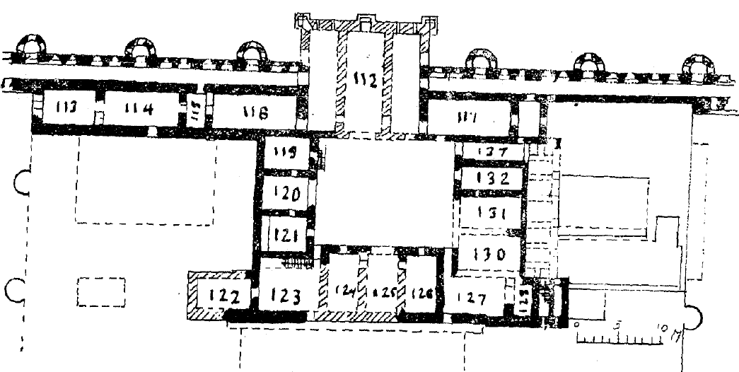 مخطط الطابق الثاني لمبنى قصر الأخيضر الاثري في العراق